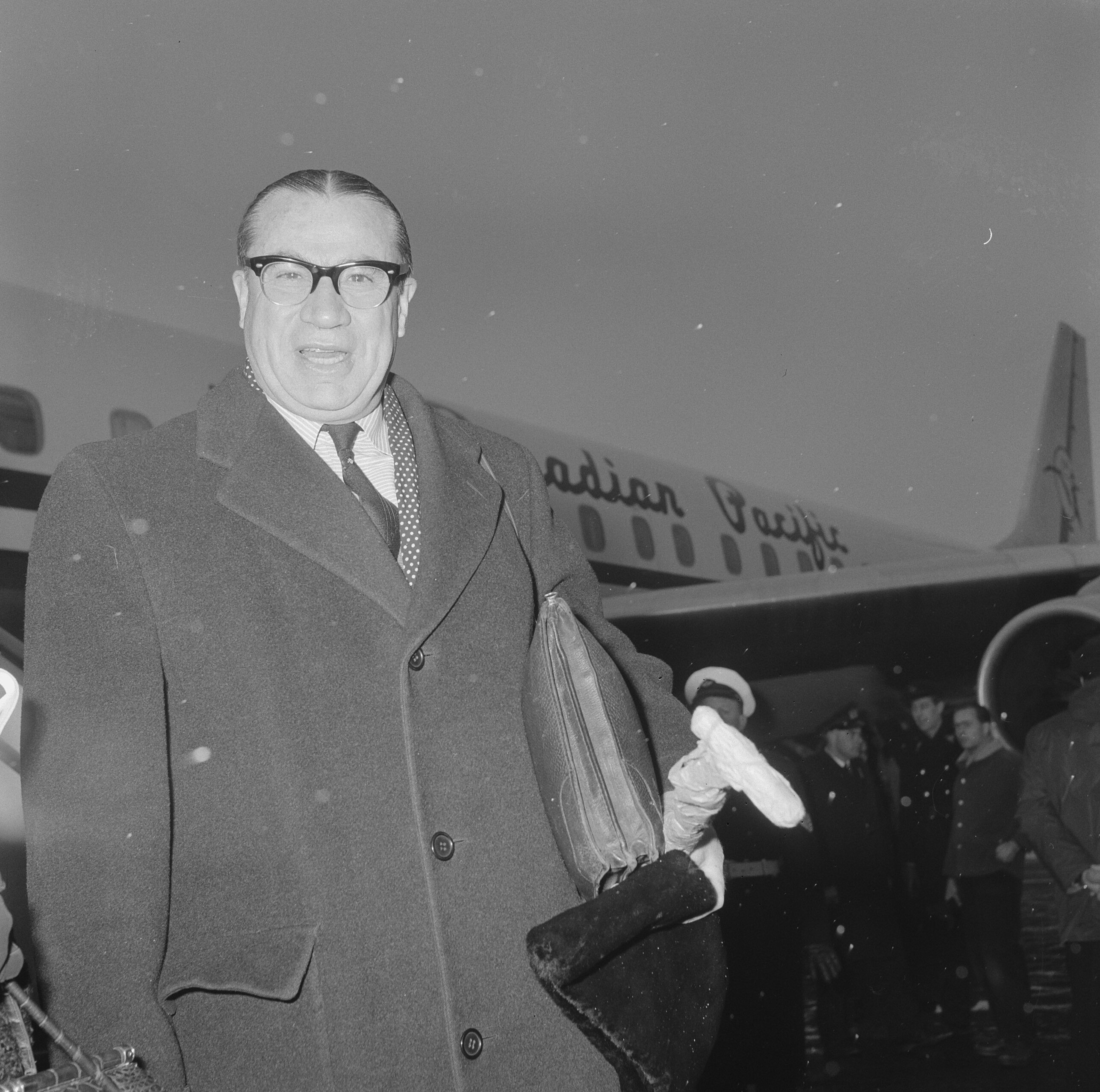 Collectie / Archief : Fotocollectie Anefo Reportage / Serie : [ onbekend ] Beschrijving : Nieuwe Ambassadeur in ons land W. F. Bull , W. F. Bull (kop) Datum : 18 februari 1963 Trefwoorden : ambassadeurs Persoonsnaam : Bull, W.F. Fotograaf : Nijs, Jac. de / Anefo Auteursrechthebbende : Nationaal Archief Materiaalsoort : Negatief (zwart/wit) Nummer archiefinventaris : bekijk toegang 2.24.01.03 Bestanddeelnummer : 914-8311